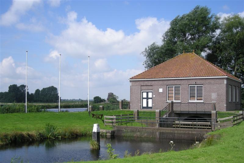 Sudergemaal